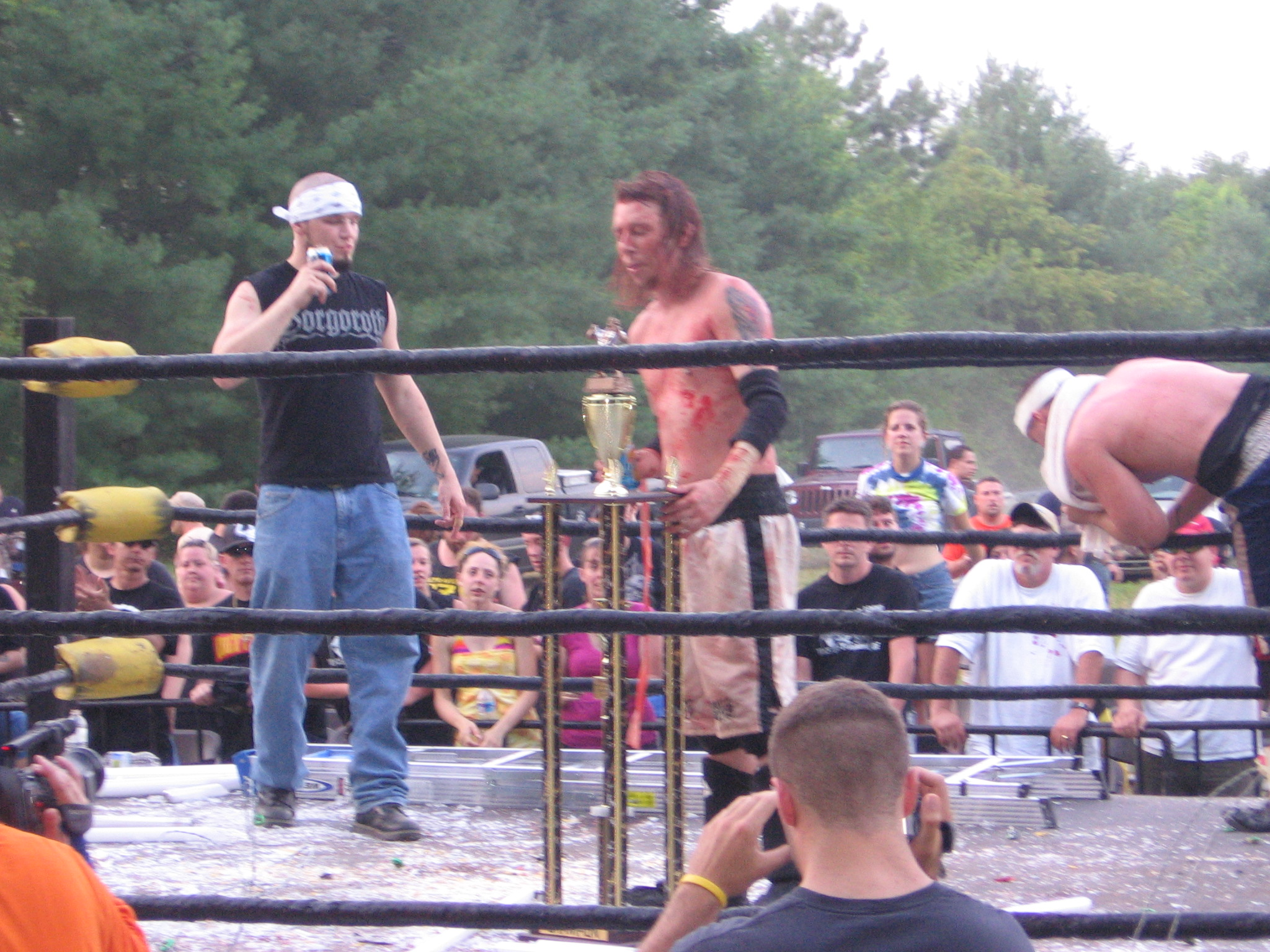 Scotty Vortekz